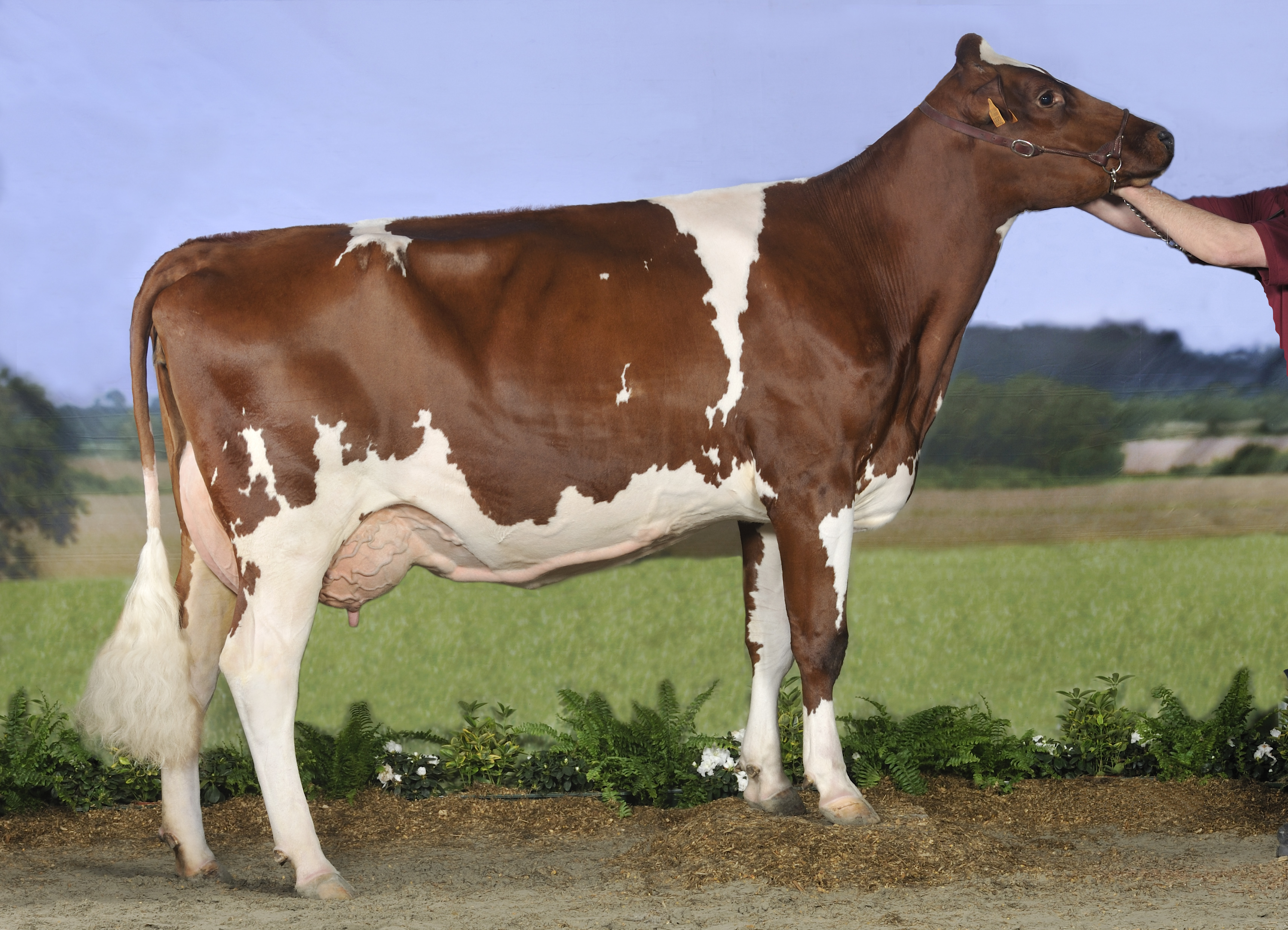 Kiana (Canvas), Prijskampen rundvee voor melkveerassen op Agriflanders 2009. CRV Koe Expo (Rood- en Zwartbont).